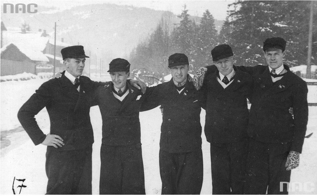 5 skieurs norvégiens lors des championnats du monde de ski à Zakopane en 1929 De gauche à droite:A. Busterud, Kristian Johansson, C. Holmen, Hans Kleppen, Hans Vinjarengen